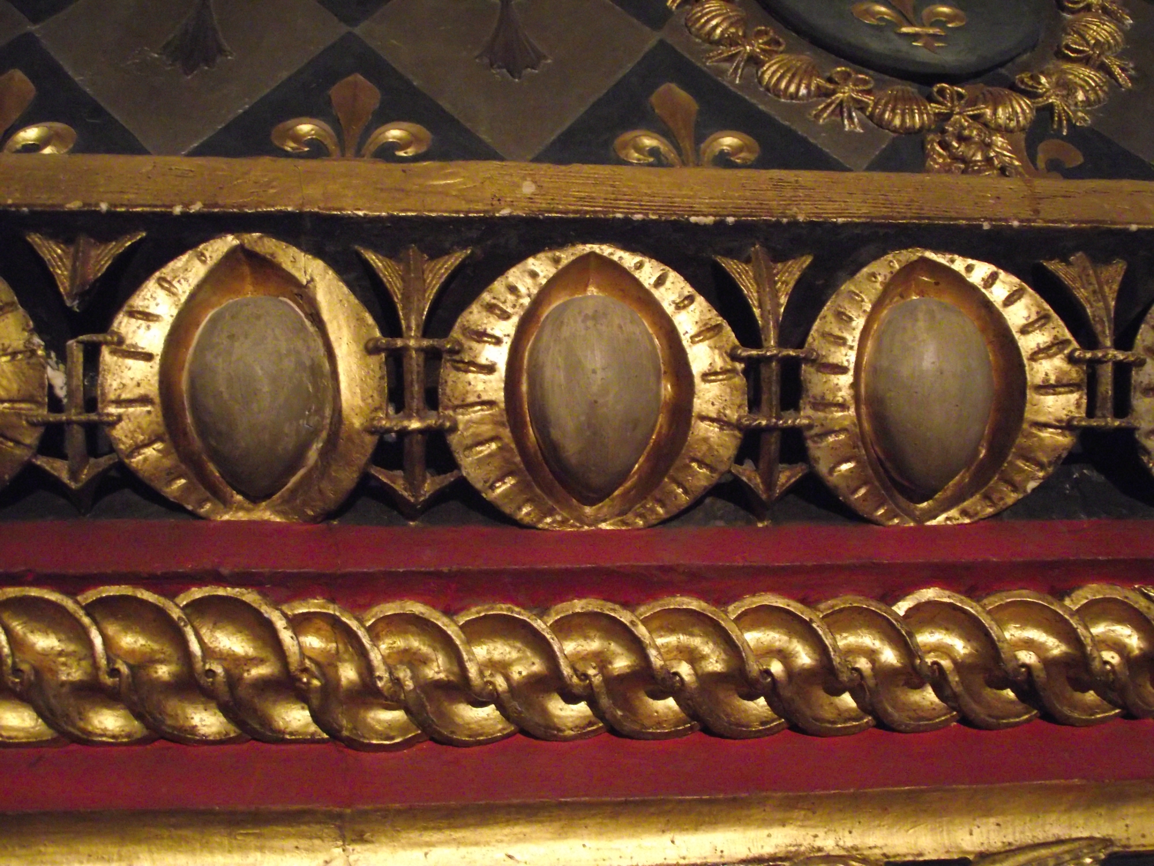 Détail de la cheminée de la grande salle - orbes et dards. Hôtel d'Alluye.